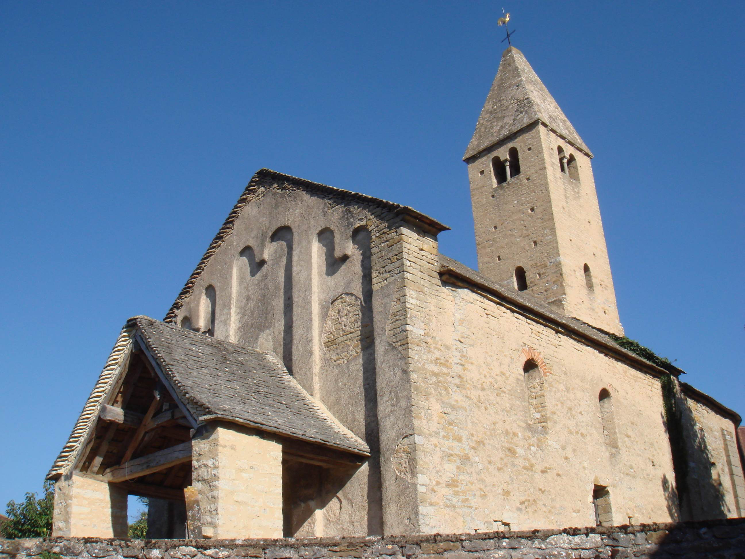 Église Saint-Roch de Vaux-en-Pré